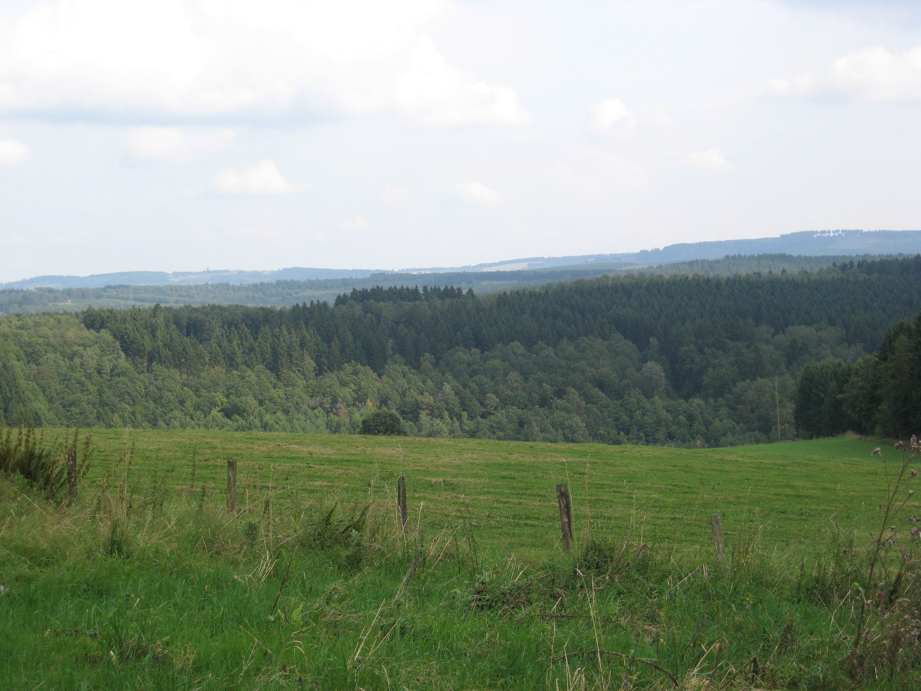 Das südöstliche Siegerland vom „Rödgen“ (Wilnsdorf-Obersdorf) aus gesehen, Blickrichtung Osten. Hinter dem vorderen Hügel liegt Oberdielfen, im Hintergrund rechts die Kalteiche.